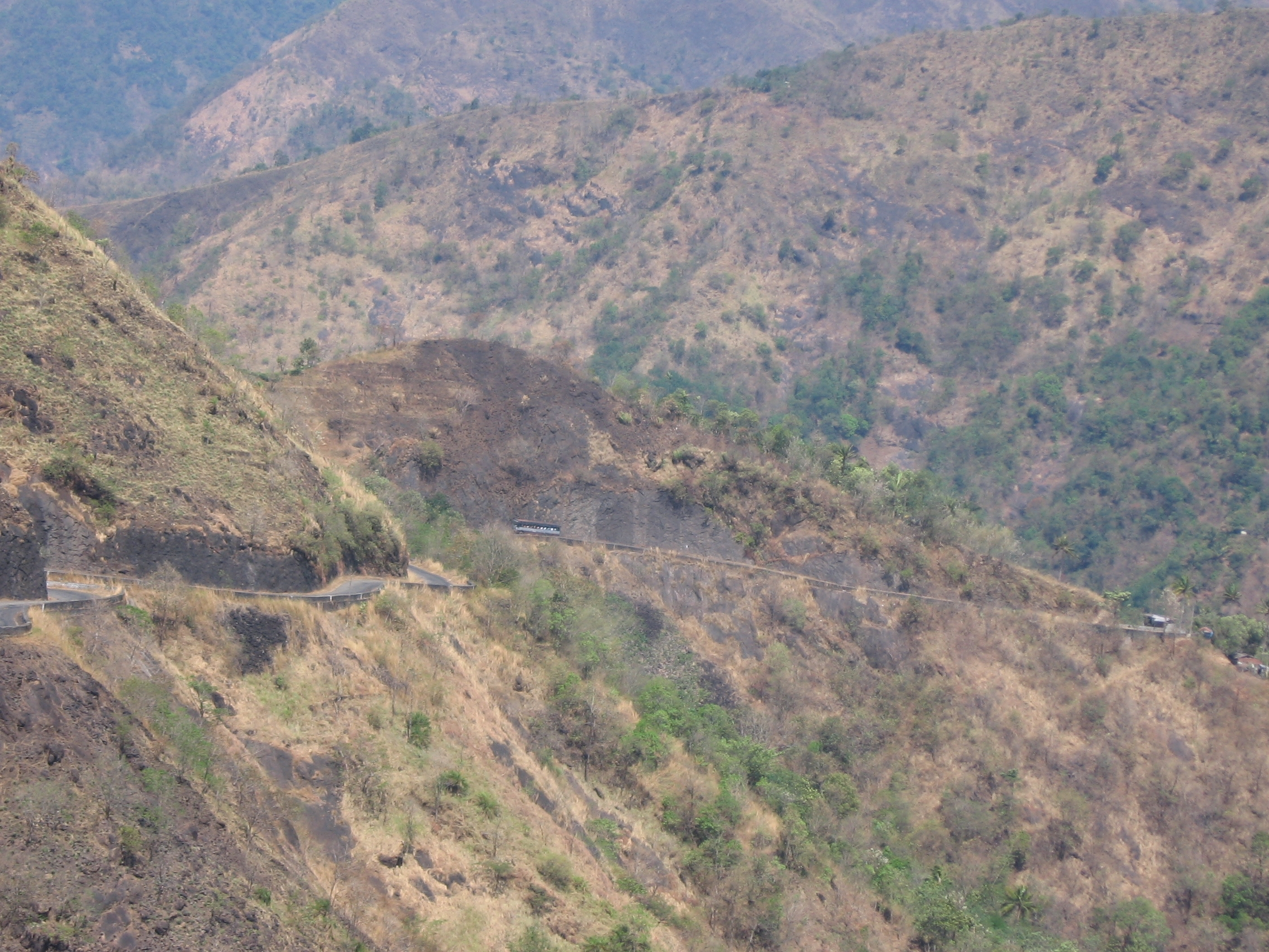 പാലായിൽ നിന്നും വാഗമണ്ണിലേയ്ക്കുള്ള വഴി